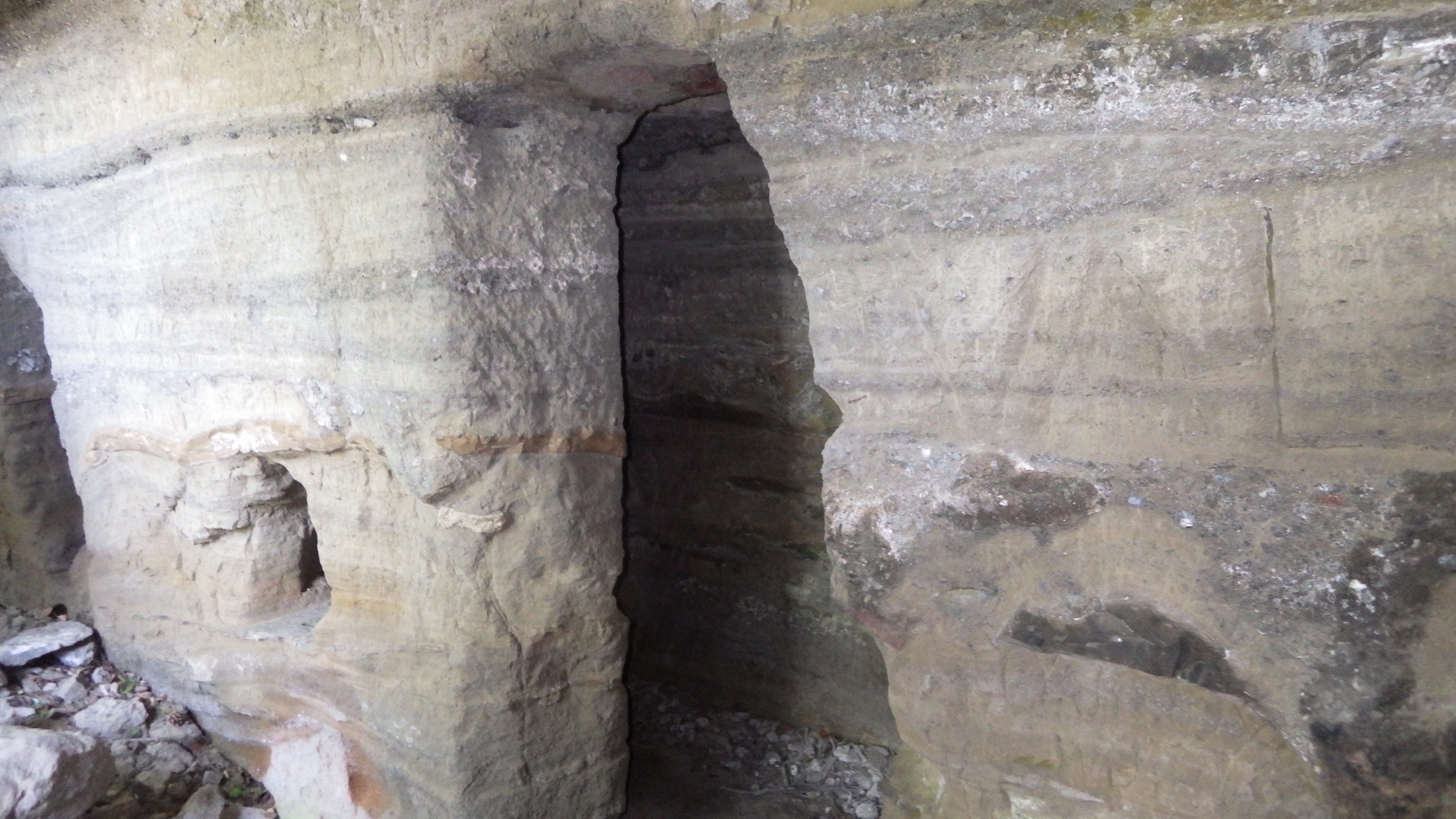 Einsiedlerhöhlen auf Tihany